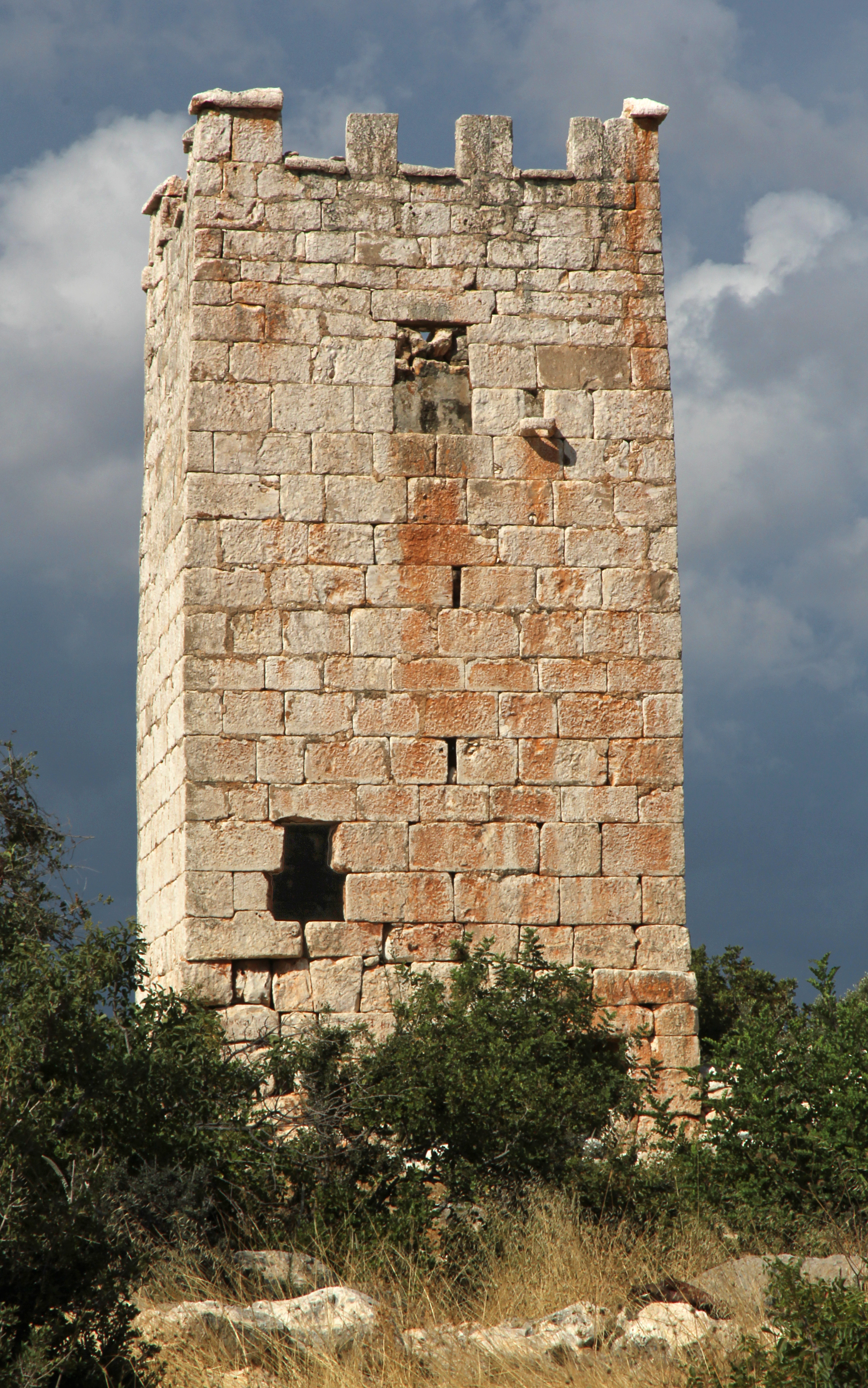 Kilikischer Turm von Sarayın bei Kızkalesi in der Südtürkei, Turm von Süden